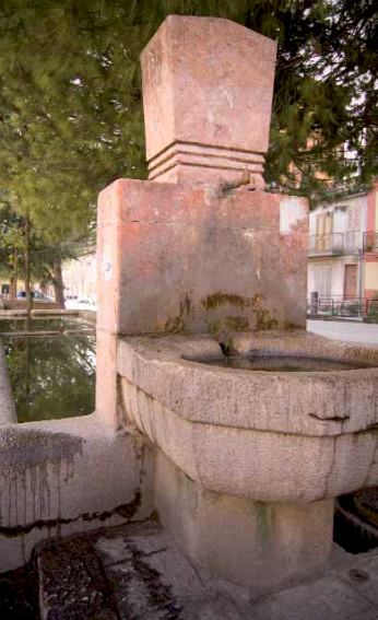 Fontana Corso Castriota (Kroi Udha Kastriota). Nella parte bassa del Corso principale, nell'attuale giardino intitolato dagli scout a "Lord Baden-Powell", è una tipica fontana in pietra e marmi locali.